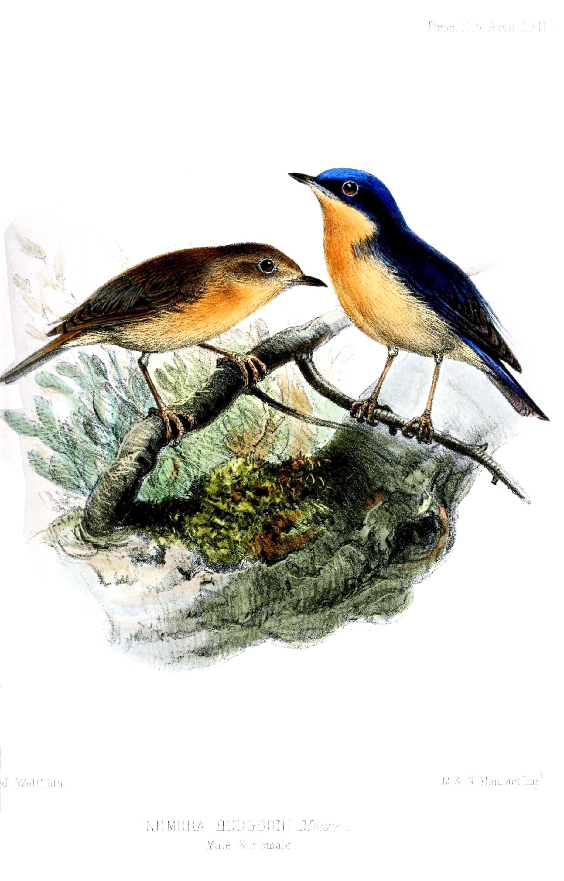 Nemura hodgsoni = Muscicapella hodgsoni